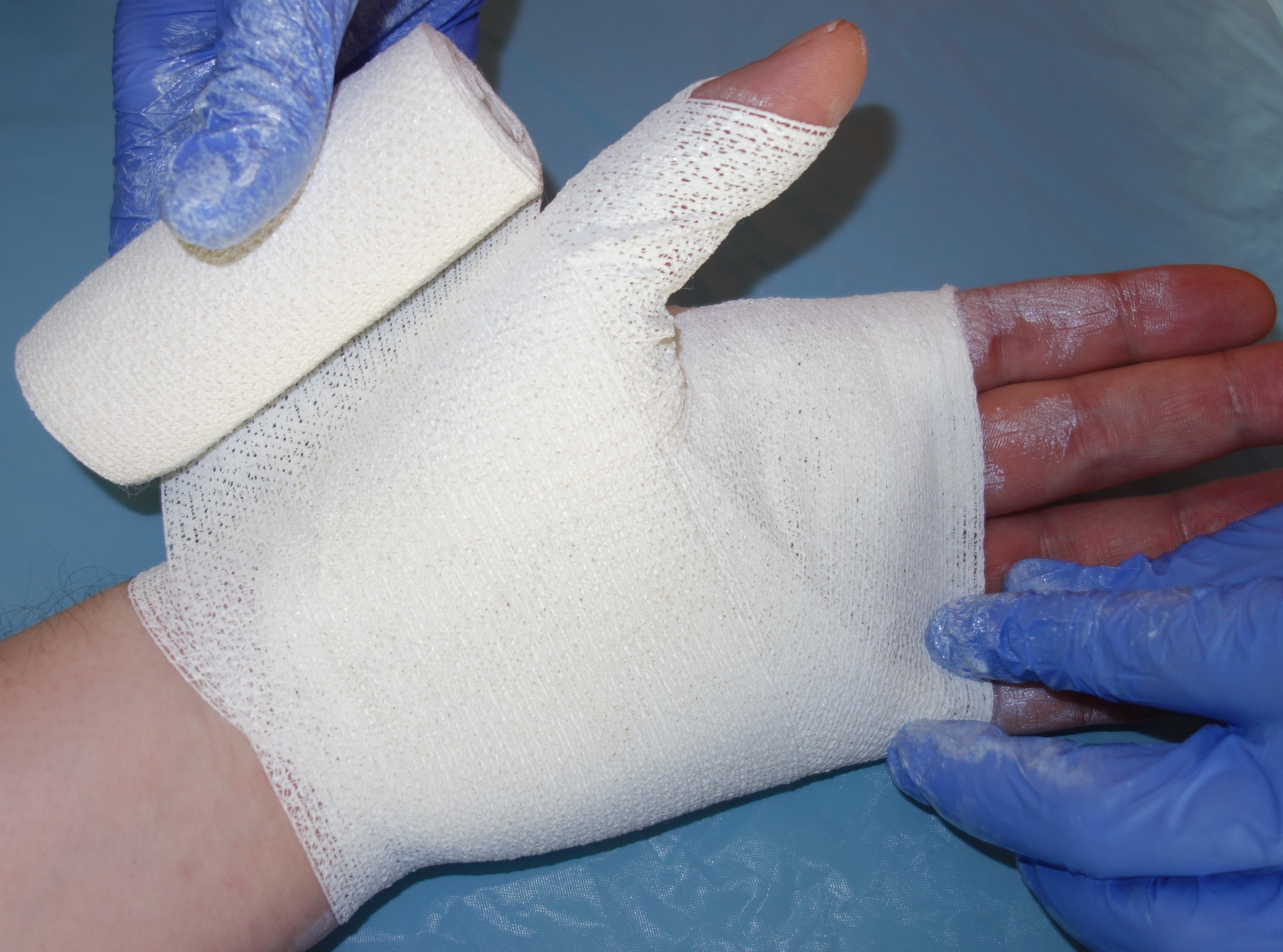 Anlage eines Zinkleimverbandes an der Hand